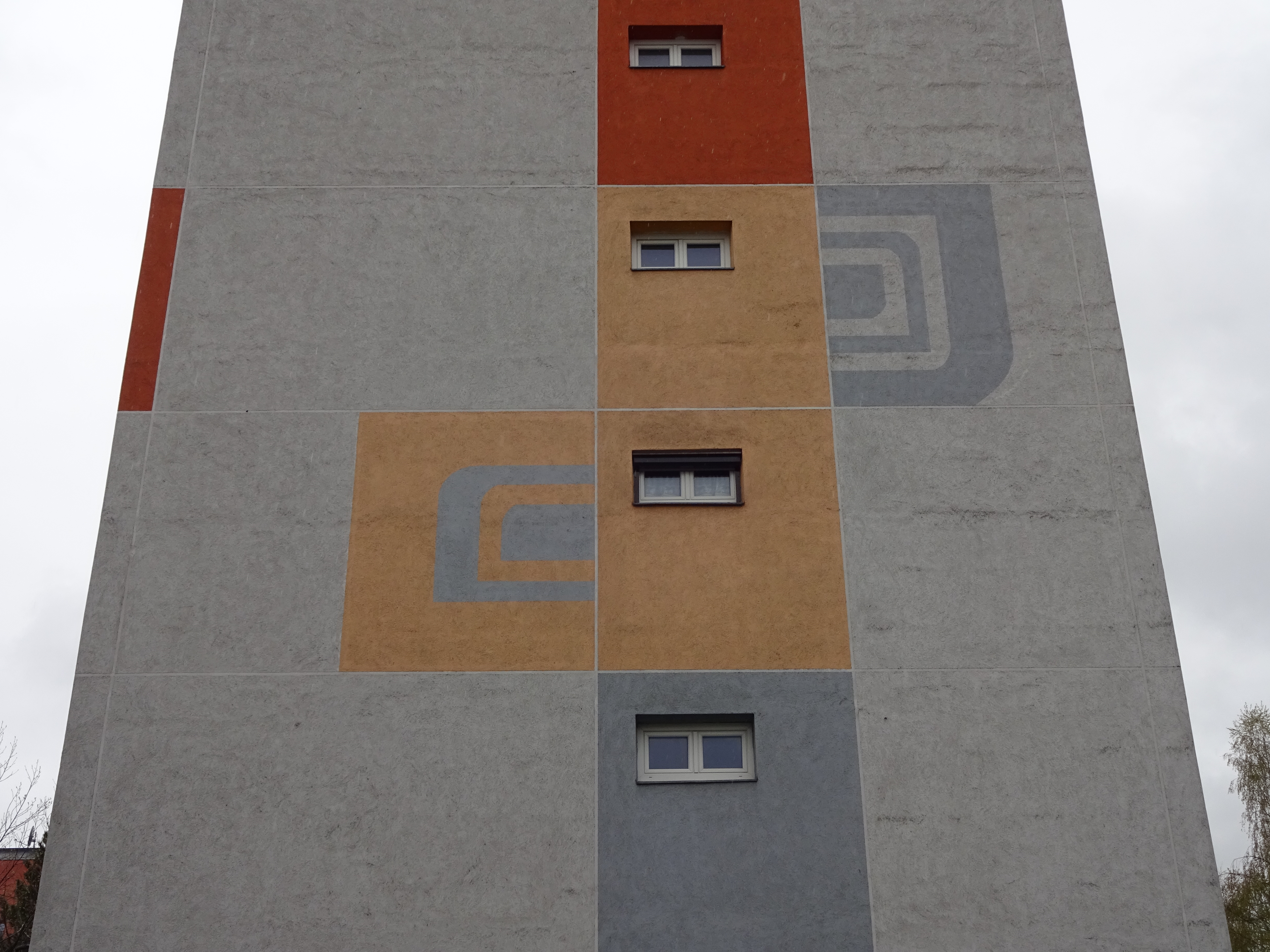 Wohnanlage Burghard-Breitner-Str 1-11, Innsbruck-Reichenau This media shows the remarkable cultural object in the Austrian state of Tyrol listed by the Tyrolean Art Cadastre with the ID 135007. (on tirisMaps, pdf, more images on Commons)